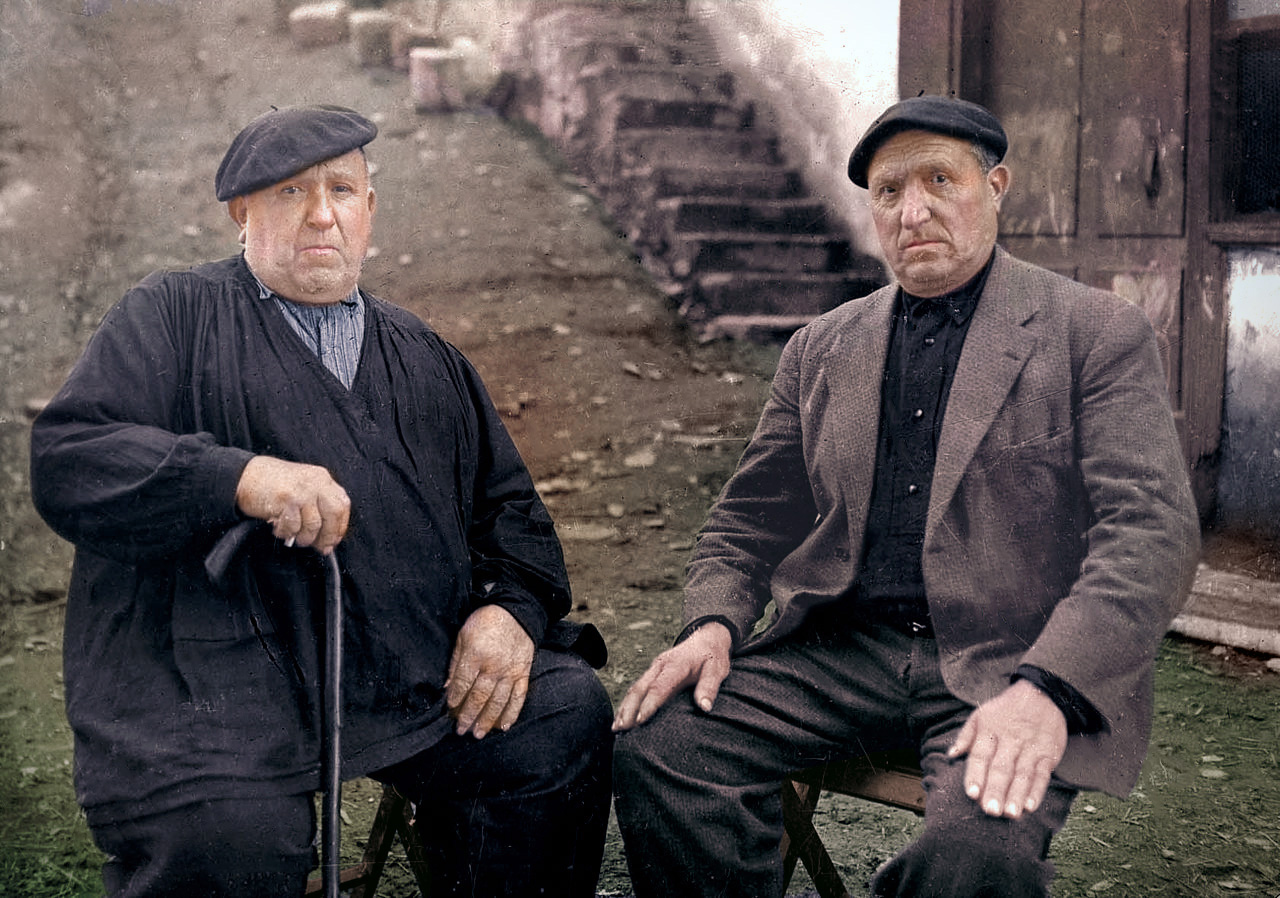 Txirrita eta Saibururen argazki koloreztatua eta hobetua